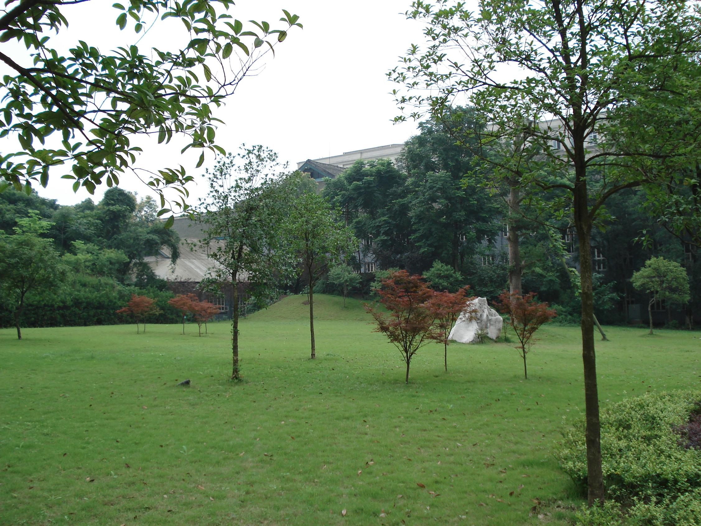 西南農業大學33教側（西南大學南區）